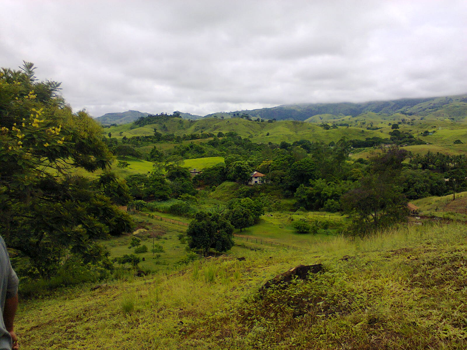 Bom Jardim se localiza na zona rural da cidade de Bom Jesus do Itabapoana no estado do Rio de Janeiro sendo um de seus distritos